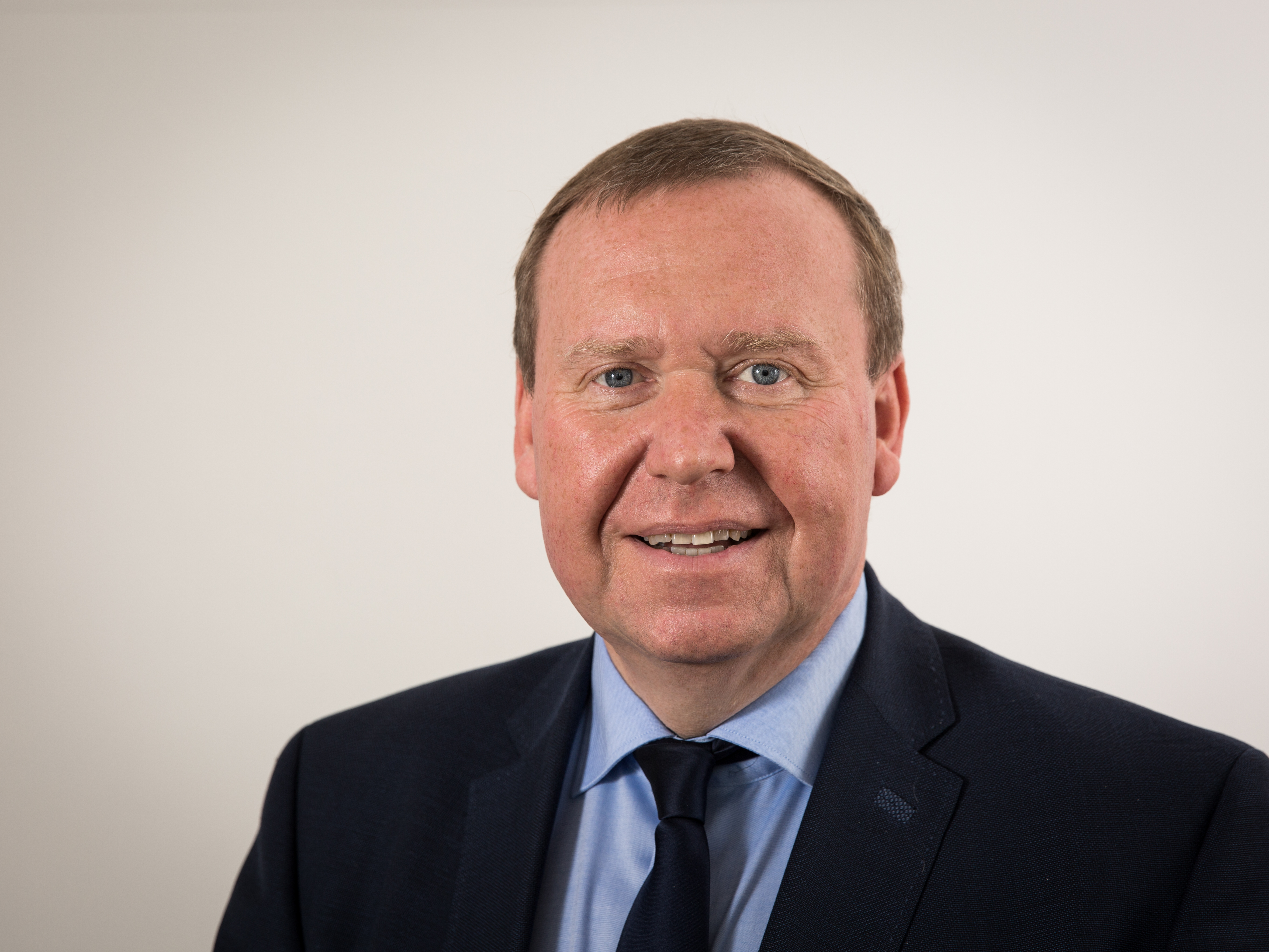 Der saarländische Landtagsabgeordnete Stefan Pauluhn